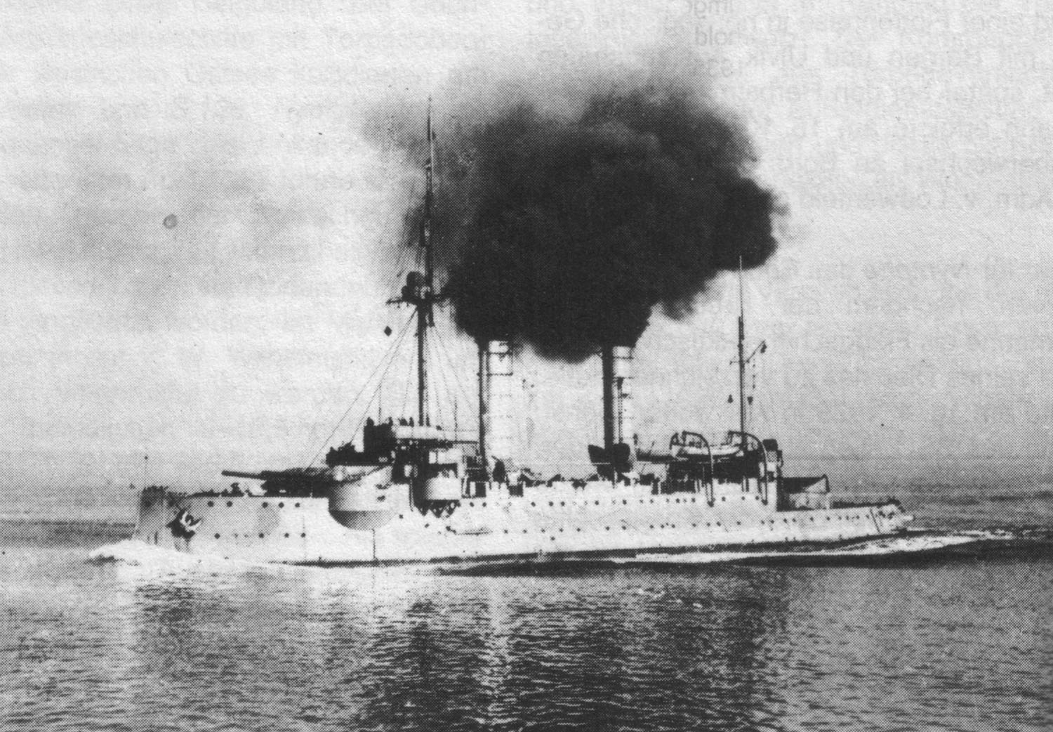 Das deutsche Küstenpanzerschiff SMS Odin während des Ersten Weltkrieges in den Jahren 1914 oder 1915.